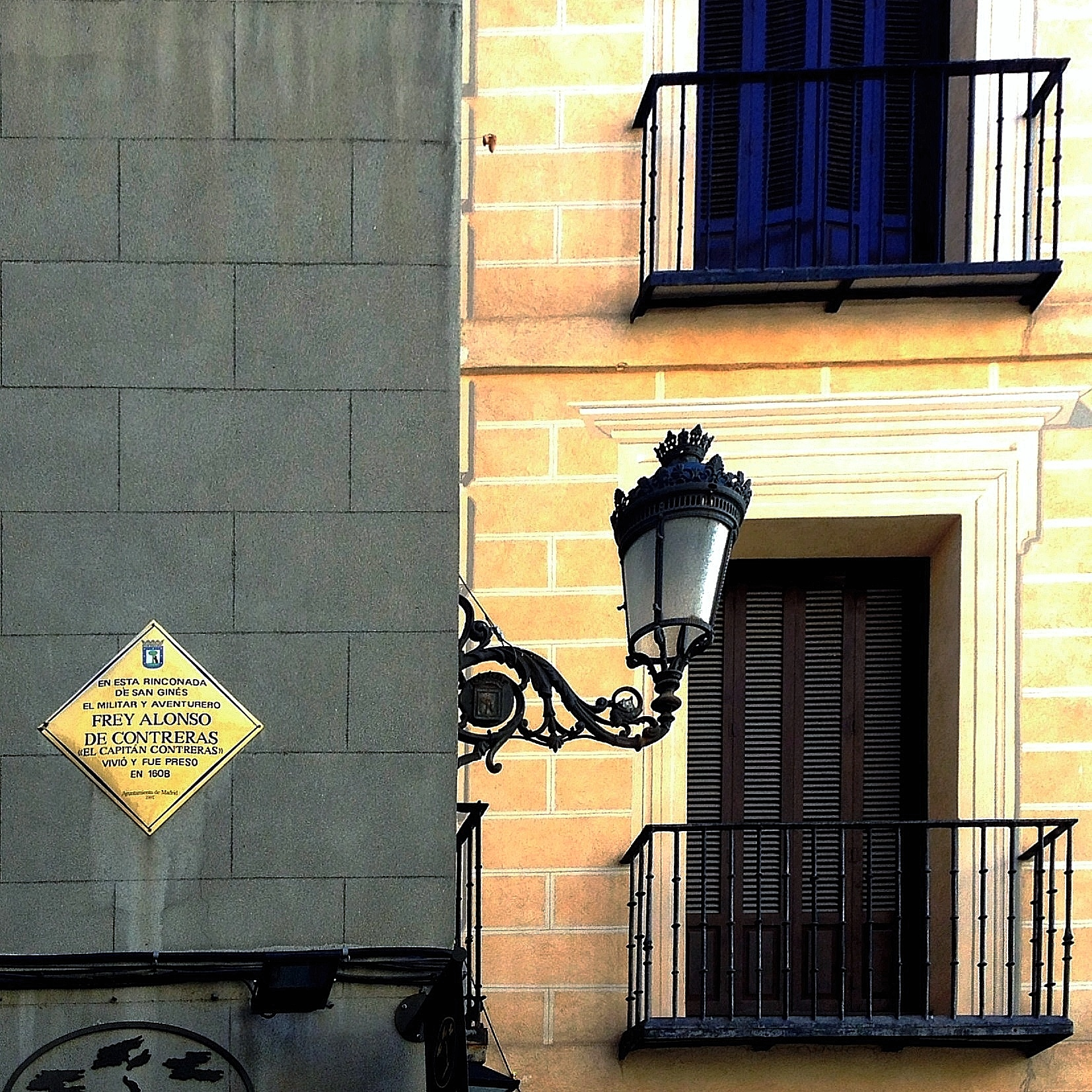 EN ESTA RINCONADA DE SAN GINÉS, EL MILITAR Y AVENTURERO FREY ALONSO DE CONTRERAS, "EL CAPITAN CONTRERAS" VIVIÓ Y FUE PRESO EN 1608